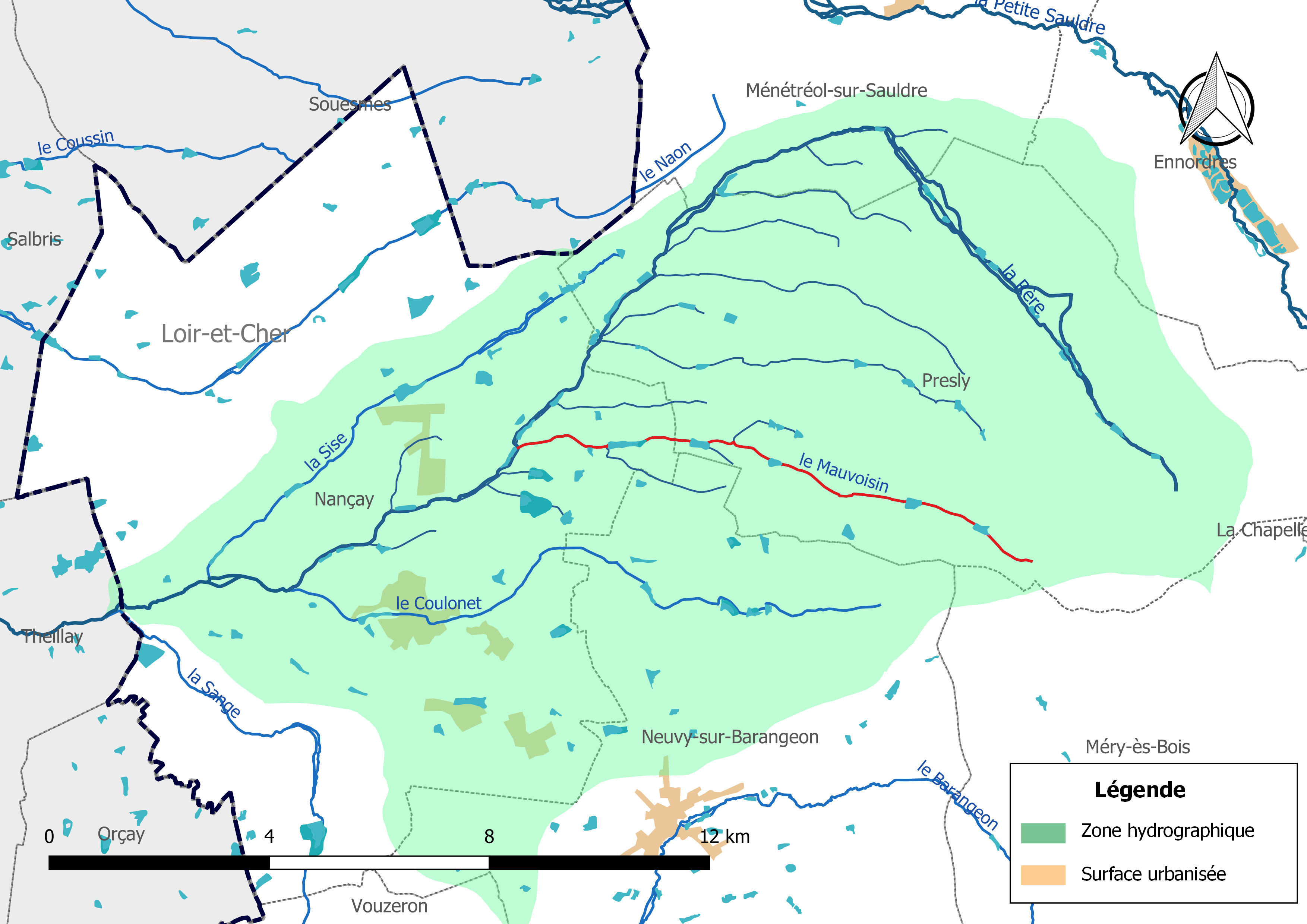 Carte du cours d'eau « le Mauvoisin » (France) et de la zone hydrographique dans laquelle il s'insère.